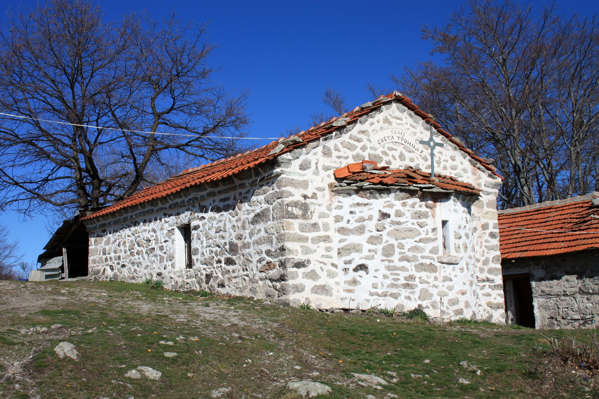 През 1956 година върху основите на старата църква е построен новият храм "Св. Троица" в местността Кръстова гора.